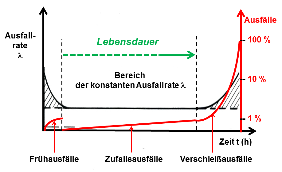 Ausfallraten-Badewannenkurve für Aluminium-Elektrolytkondensatoren